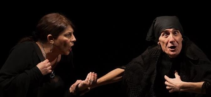 Foto teatrale